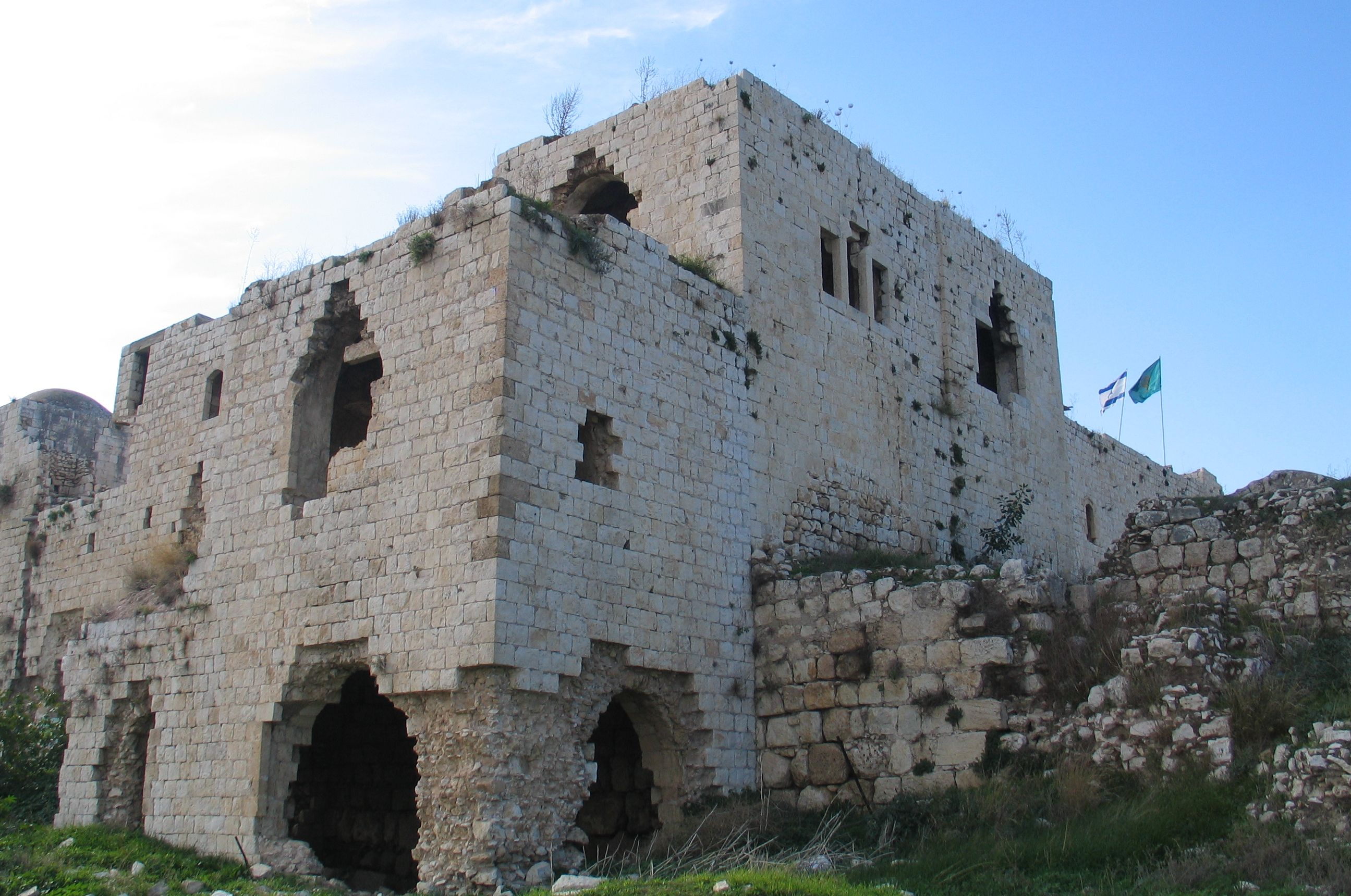 Migdal Afek, Israel.